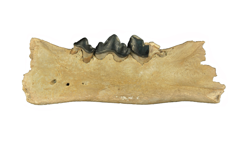 Rhizosmilodon fiteae - UF 22890